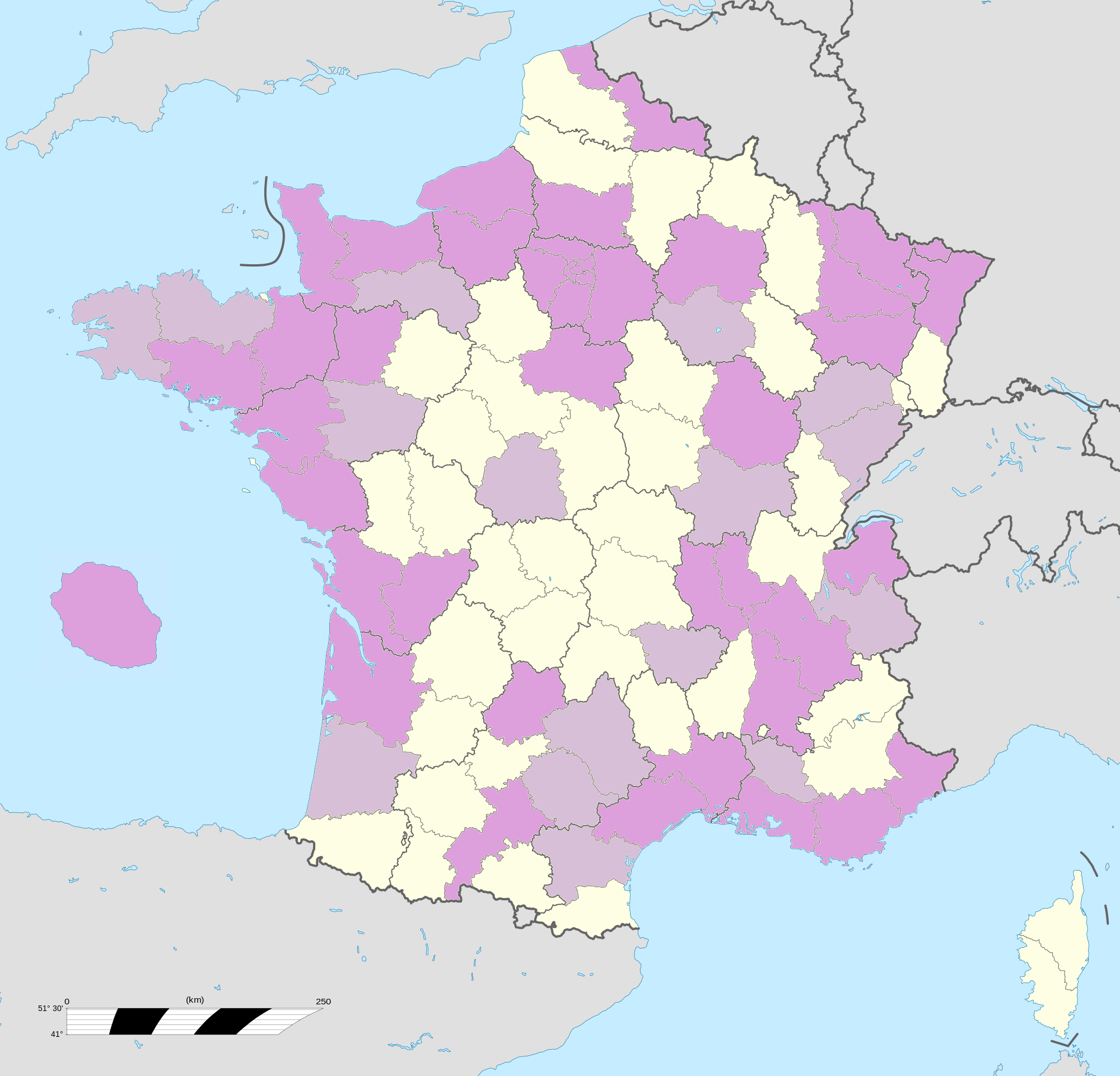 Répartition des fédérations de l'UDI jeunes en France au 9 février 2015.